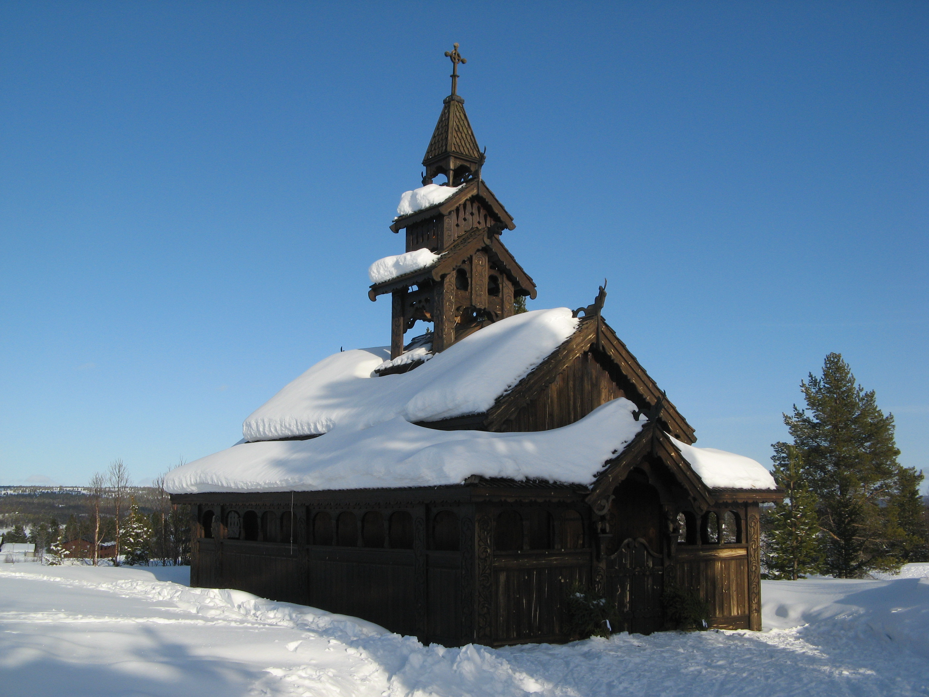 Oset fjellkyrkje